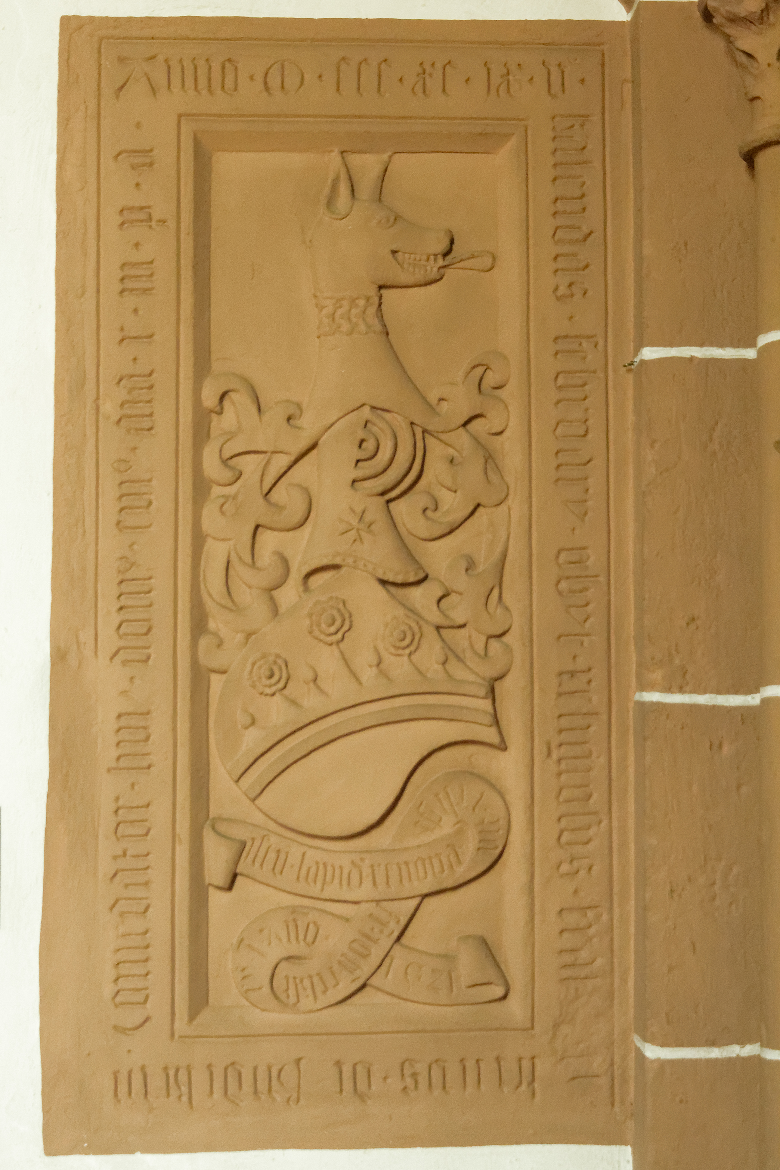 Grabplatte des Komturs Helfrich von Rüdigheim in der Kirche St. Johannes Baptist in Mosbach, einem Ortsteil der Gemeinde Schaafheim (Hessen).